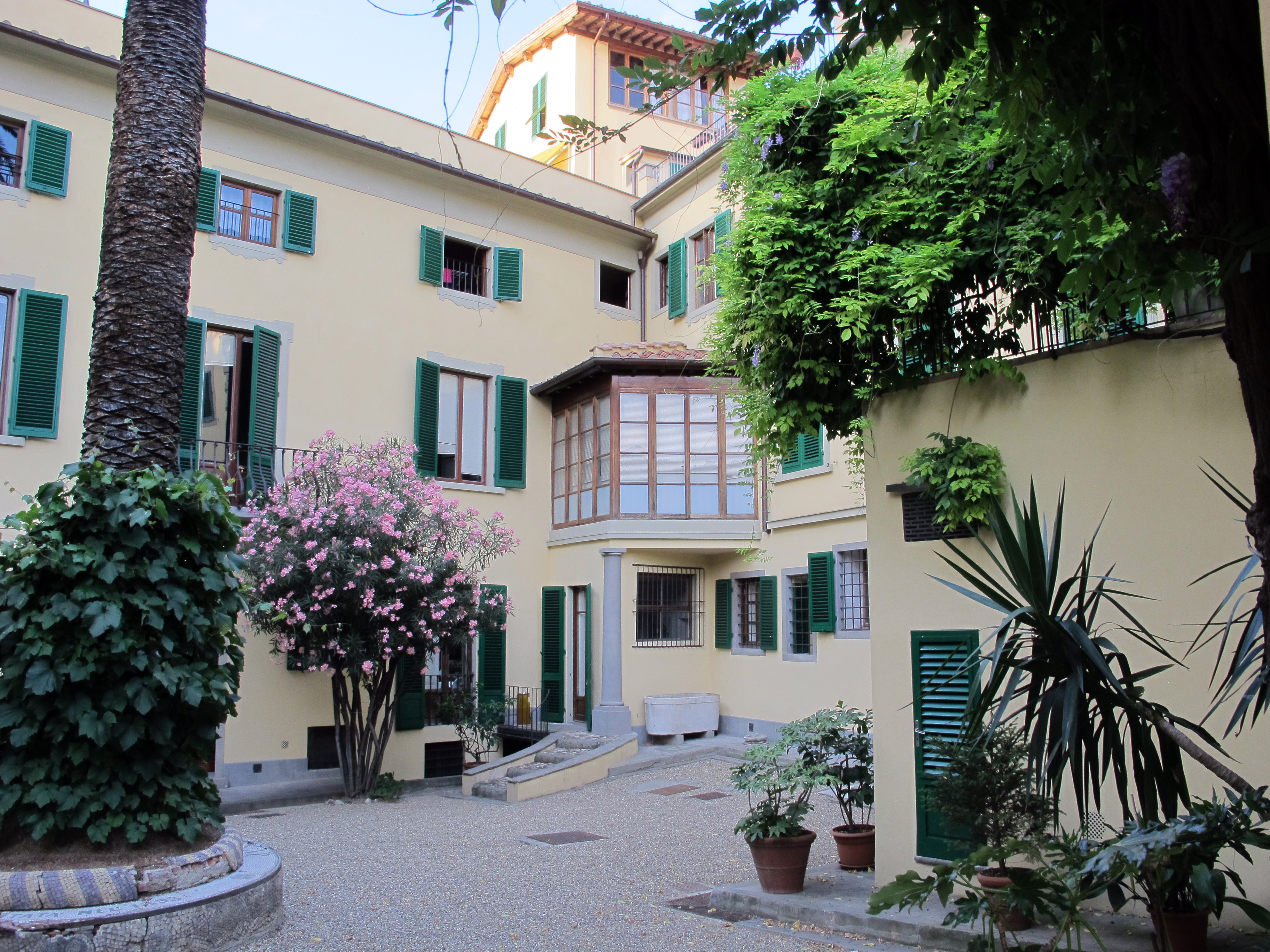 Palazzo Bombicci Pontelli, giardino